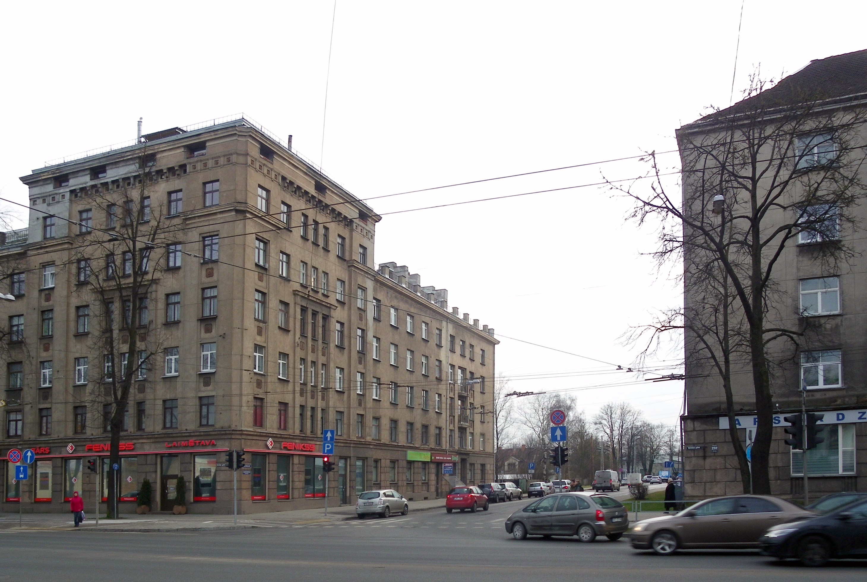 Viļa Ģelbes iela, skats no Brīvības gatves